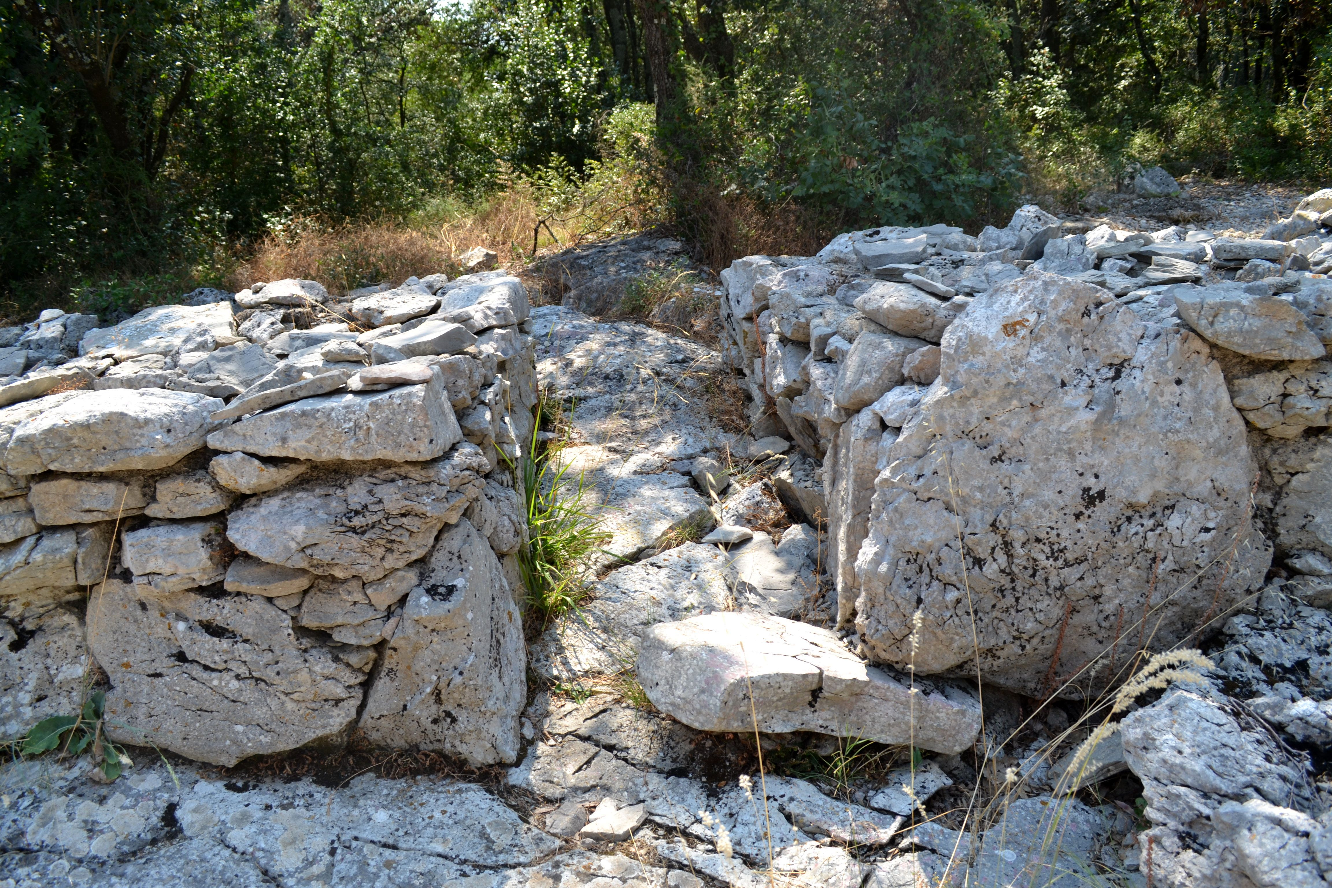 Village préhistorique de Cambous à Viols-en-Laval (34). Entrée ouest de la cabane n°11 (groupe B).